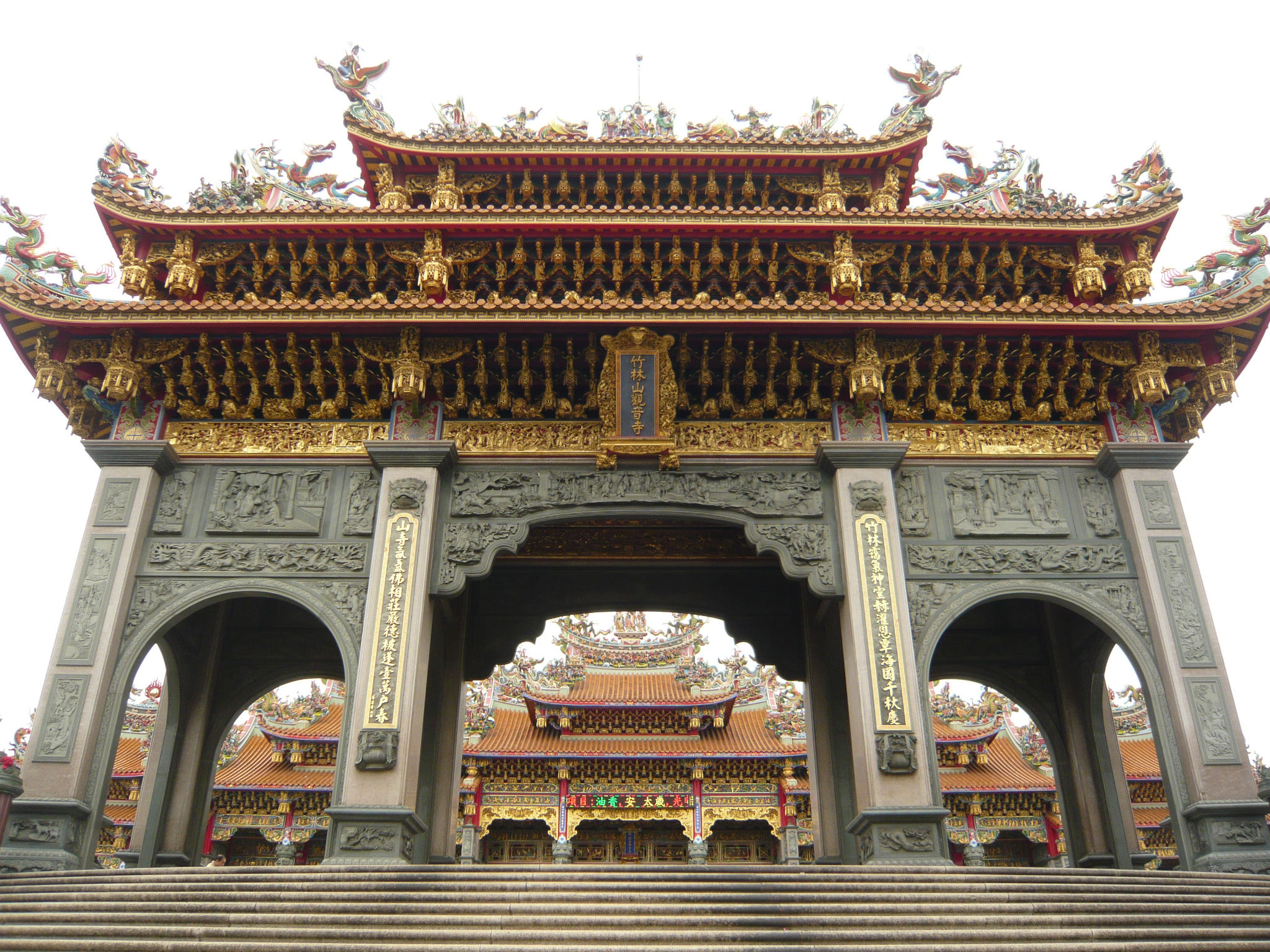 正門照（已修建完工）。